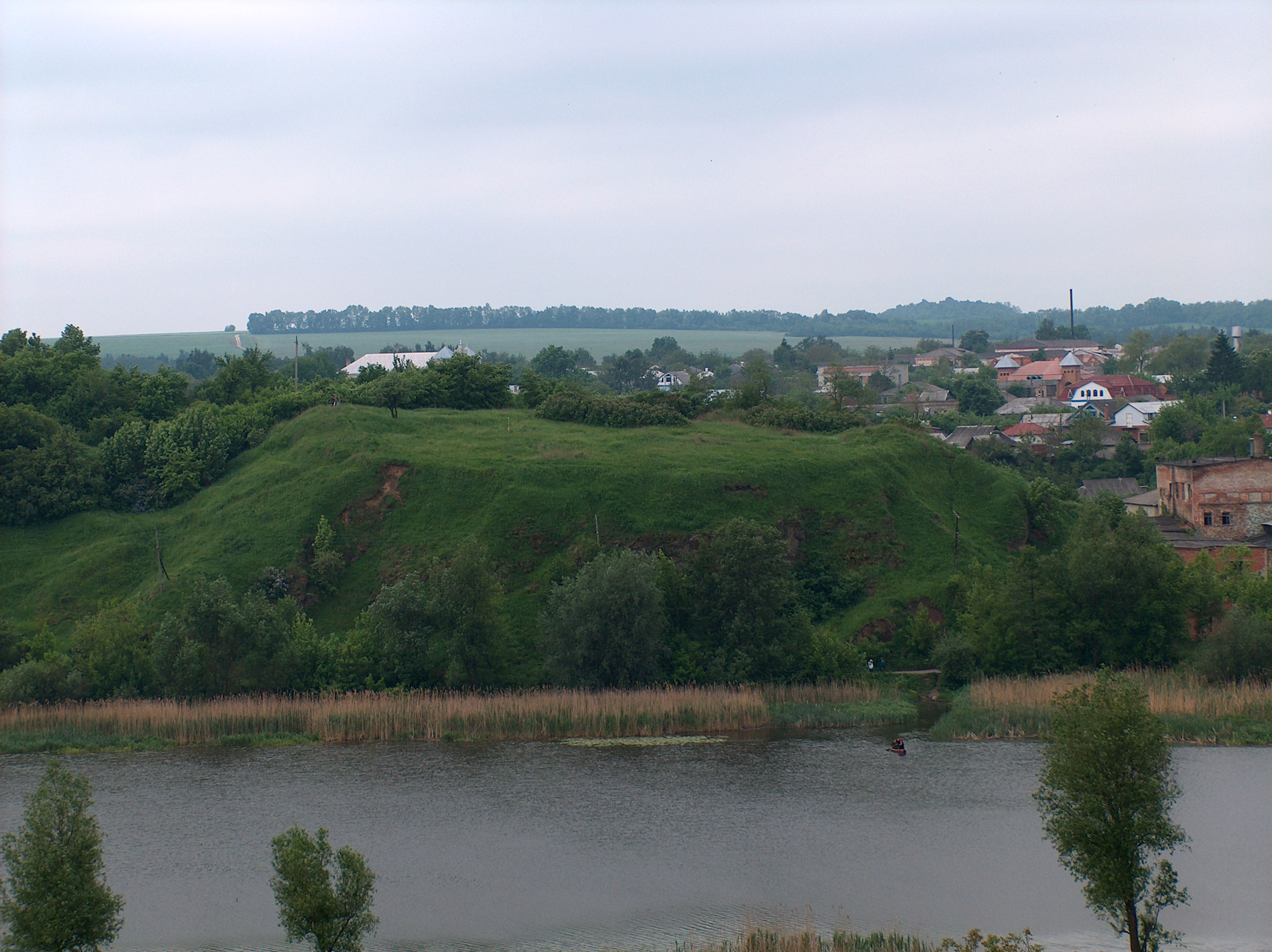 Городище двохшарове, Брацлав